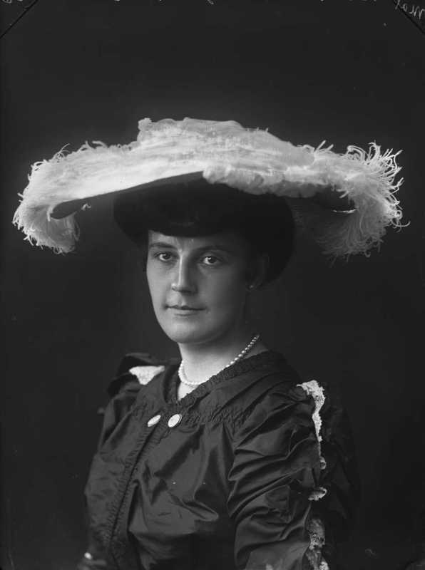 Magda Blanc var en av de fremste skuespillerne ved Den Nationale Scene i Bergen. Fotografiet av Magda Blanc er fra 1906. Det tilhører Oslo Museums samlinger og er publisert på